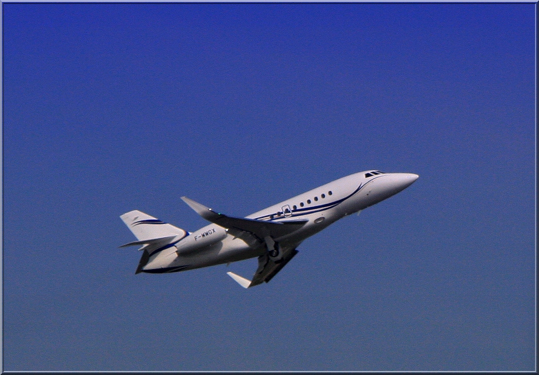 Le 26 avril 2009, après une modification structurale de ses ailes le Falcon 2000EXeasy numéro de série 161 effectue son premier vol au départ du Bourget équipé de winglets, il devient le Falcon 2000LX S/N-161. Les équipes de l'établissement de Martignas et de DFS ont mené à bien cette modification en attendant la certification officielle qui était attendue dans les jours suivants. DASSAULT FALCON 2000 LX S/N-161.